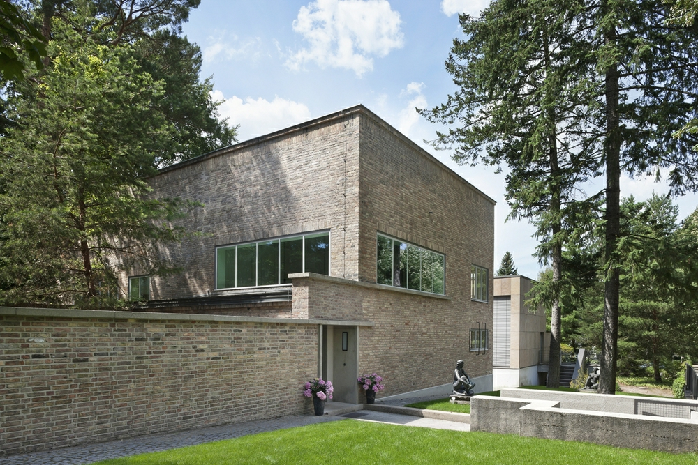 Eingang Georg Kolbe Museum Bildhaueratelier